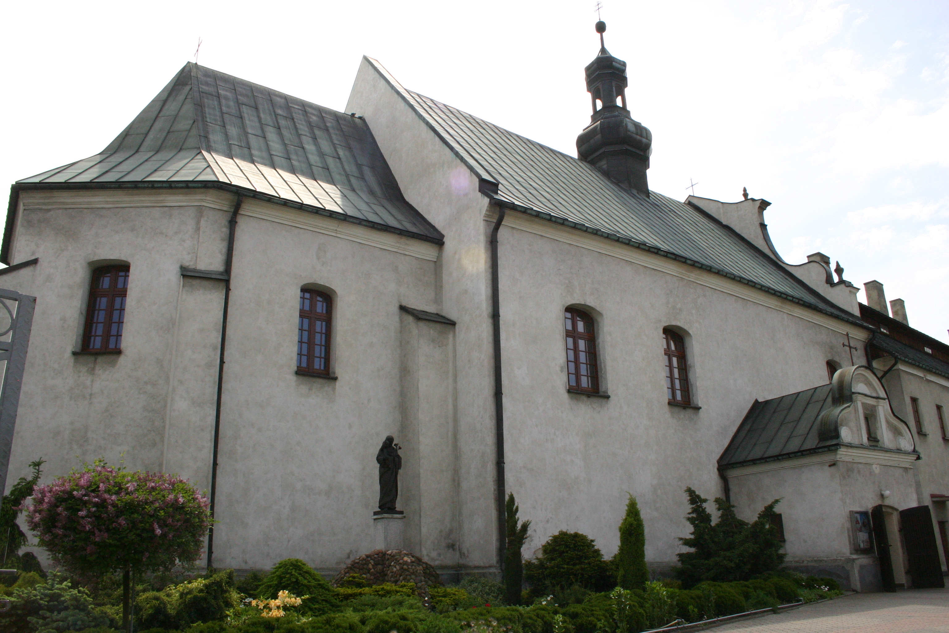 Kościół p.w. św. Mikołaja Biskupa/LD/336-XIV-50 z 28.04.1949/Wieluń